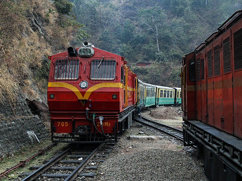 Kalka - Shimla Railway - India, 02/01/2012